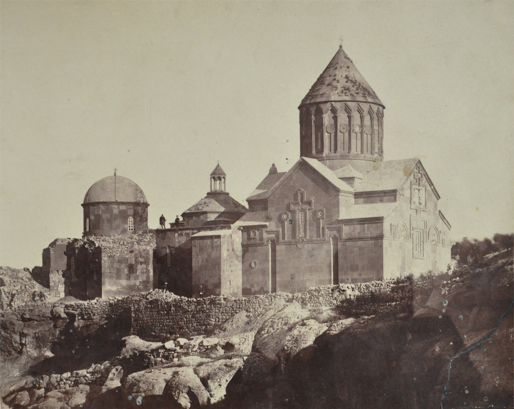 Հառիճավանքը 1872 թվականին